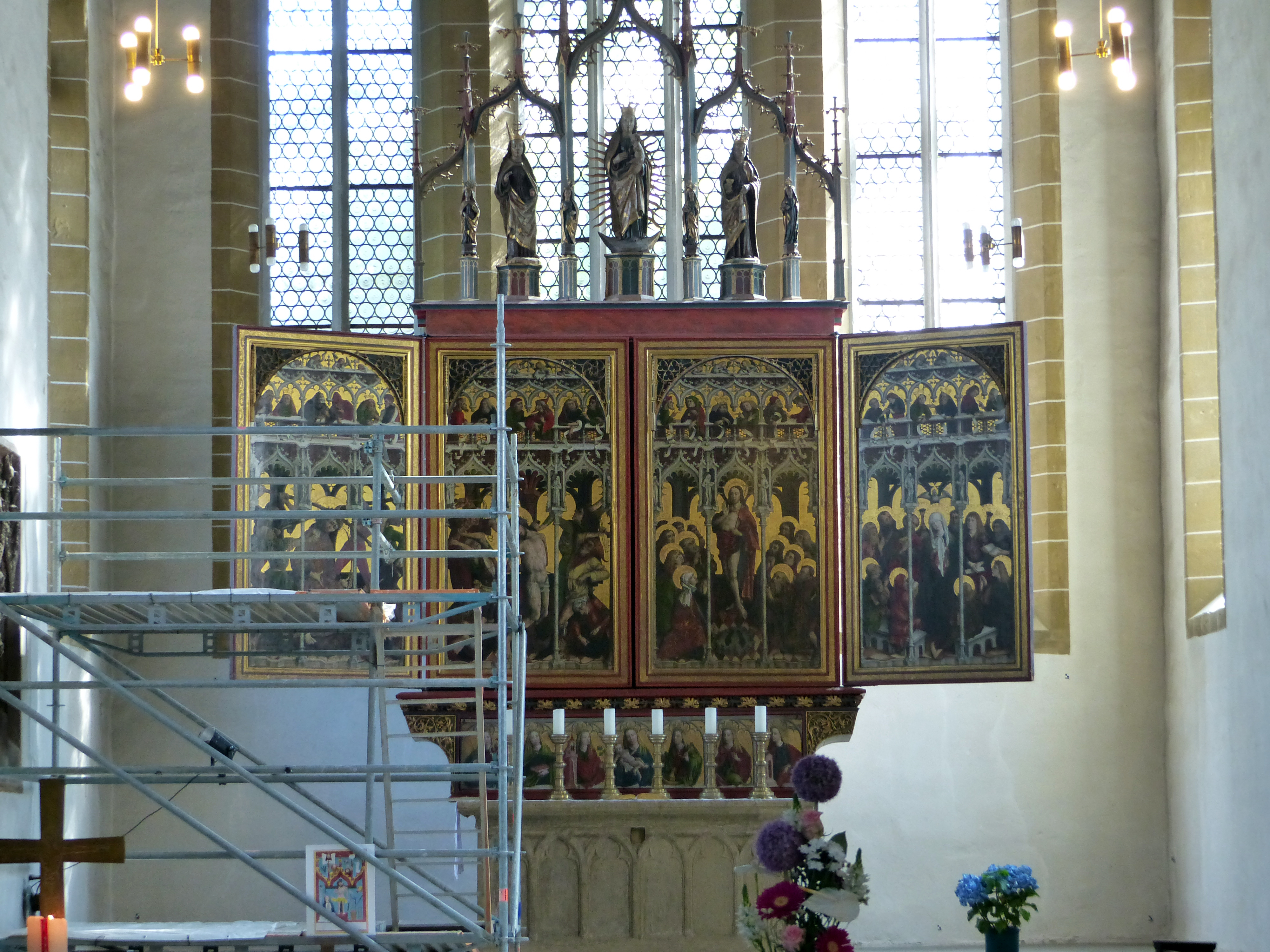 Reglerkirche, Bahnhofstraße 7, Erfurt